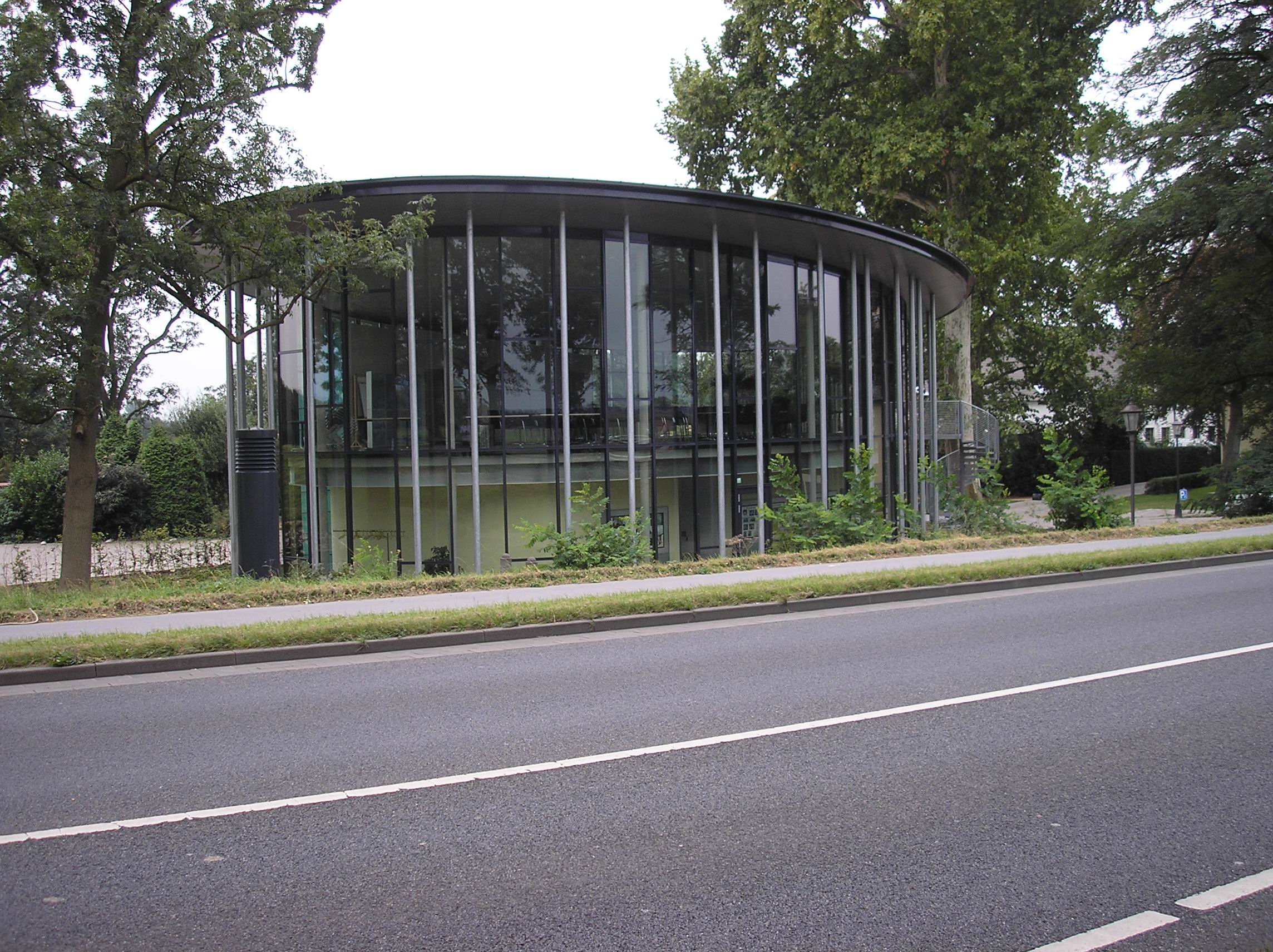 Sitzungssaal der Euregio Rhein-Waal am Haus Schmithausen in Kleve-Kellen